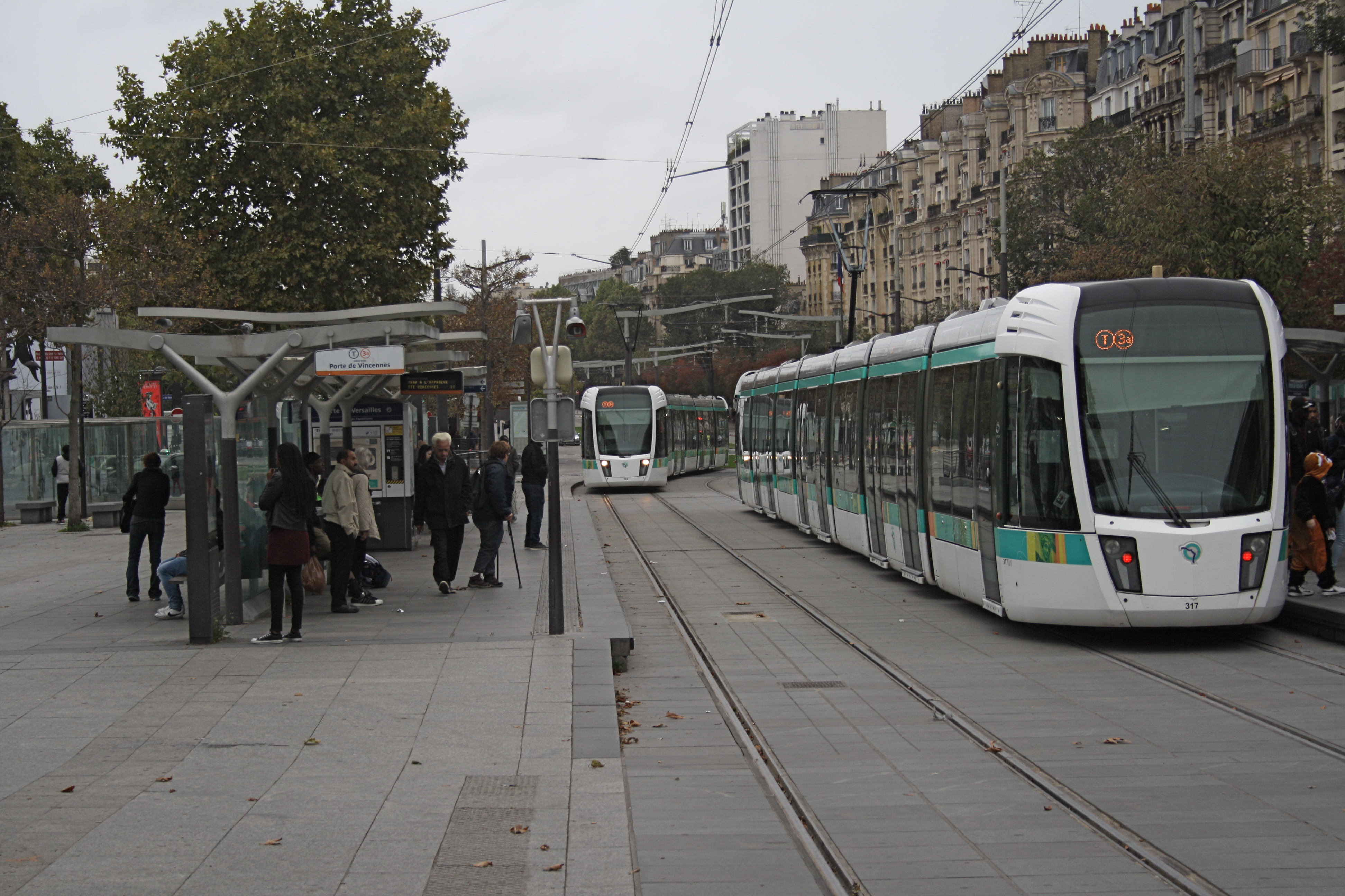 Haltestelle Porte de Versailles der Pariser Straßenbahnlinie 3a